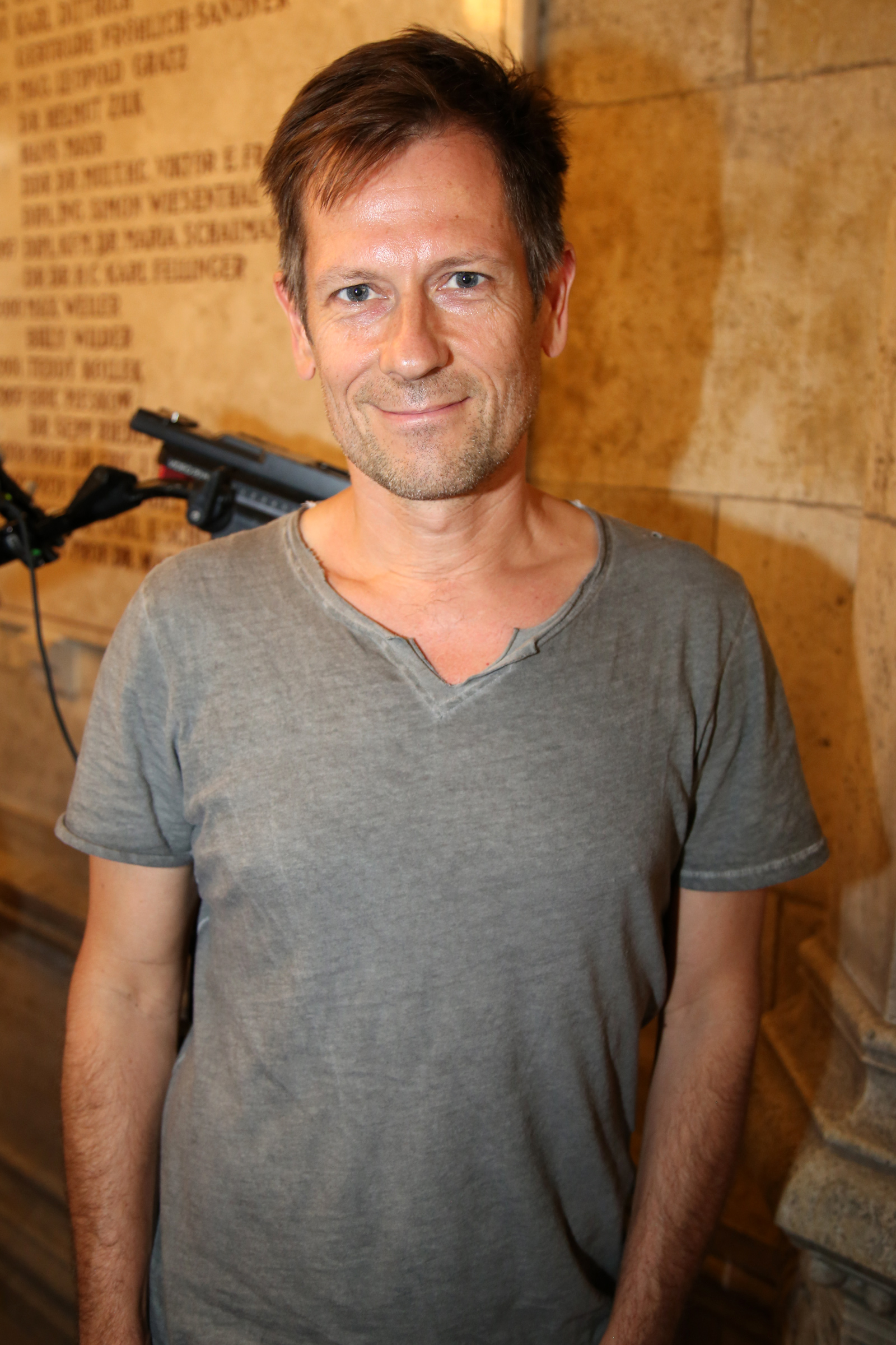 Werner-Lobo_Klaus-5845